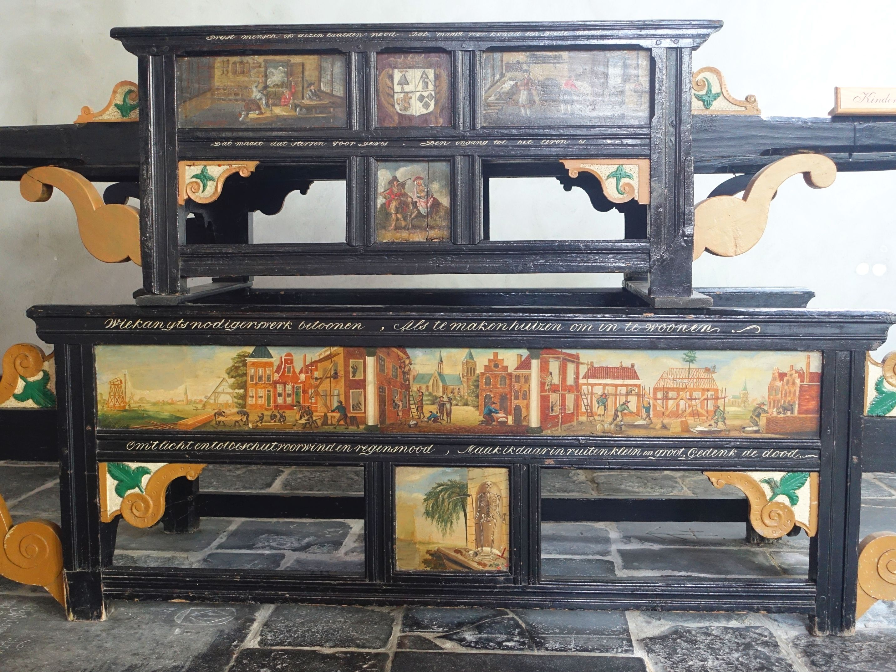 Zunftbahren in der Gertraudiskerk Workum